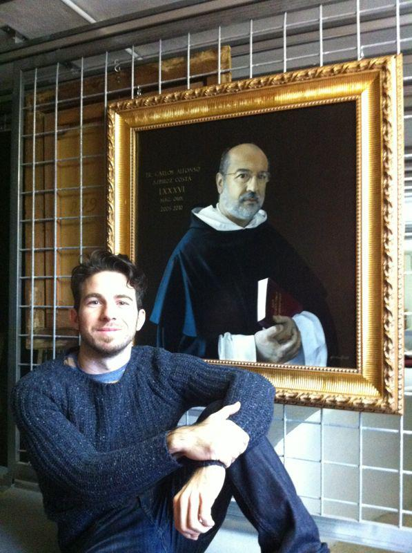 Massimiliano Pironti vor dem Ölportrait von Carlos Azpiroz OP. Von Pironti für Santa Sabina gemalt, wo es in der Gallerie der Ordensmeister hängt.